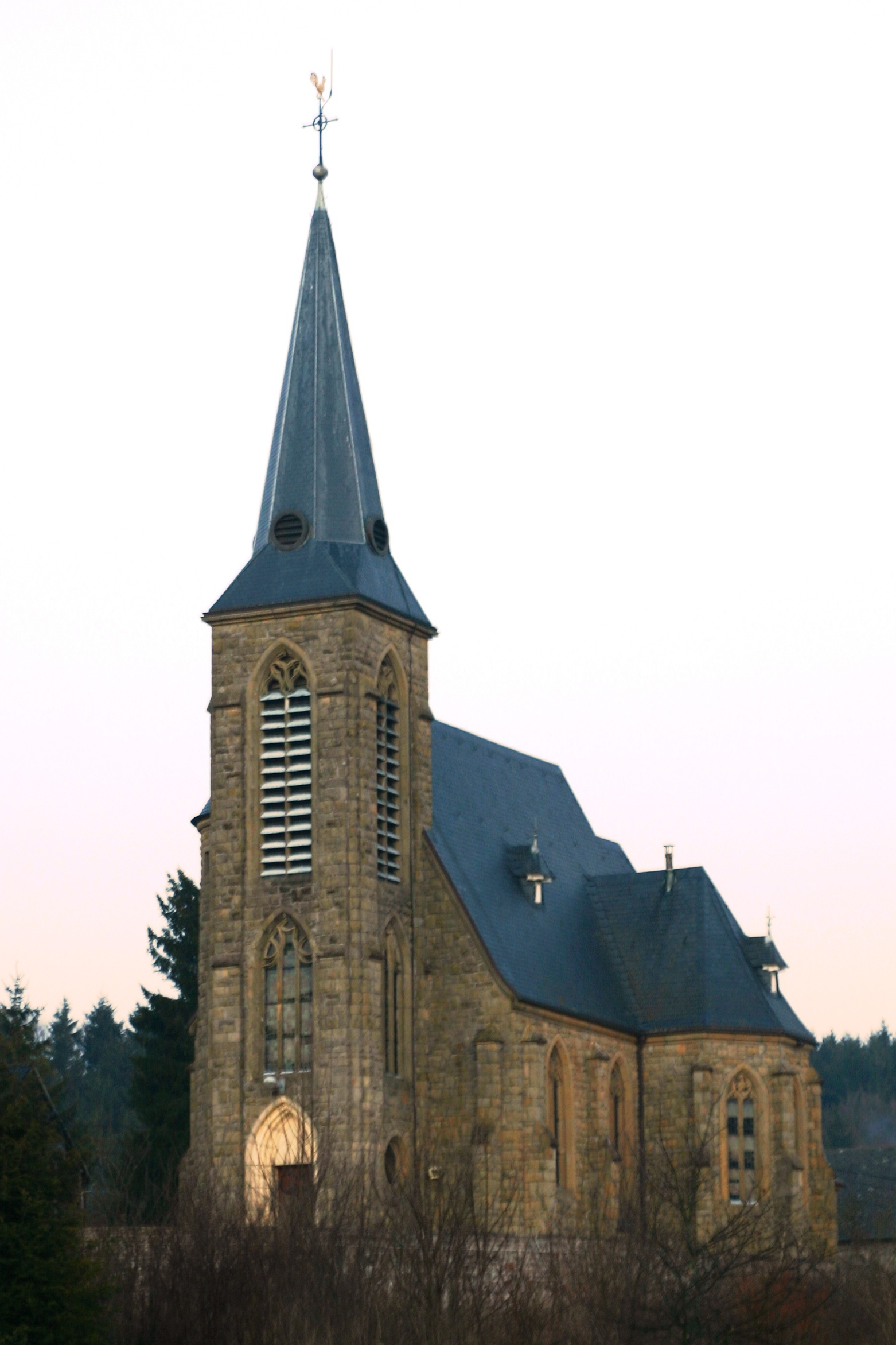 Kierch vun Oudler.